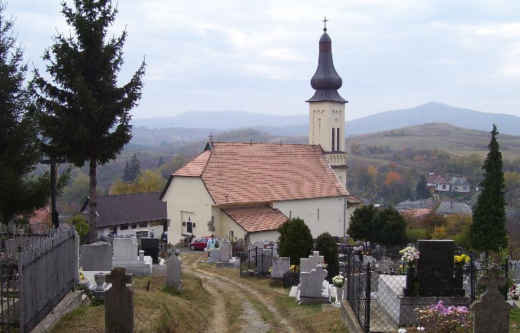 A zagyvarónai középkori Szent András római katolikus templom a 19. században épí­tett templomtornyával 2006-ban